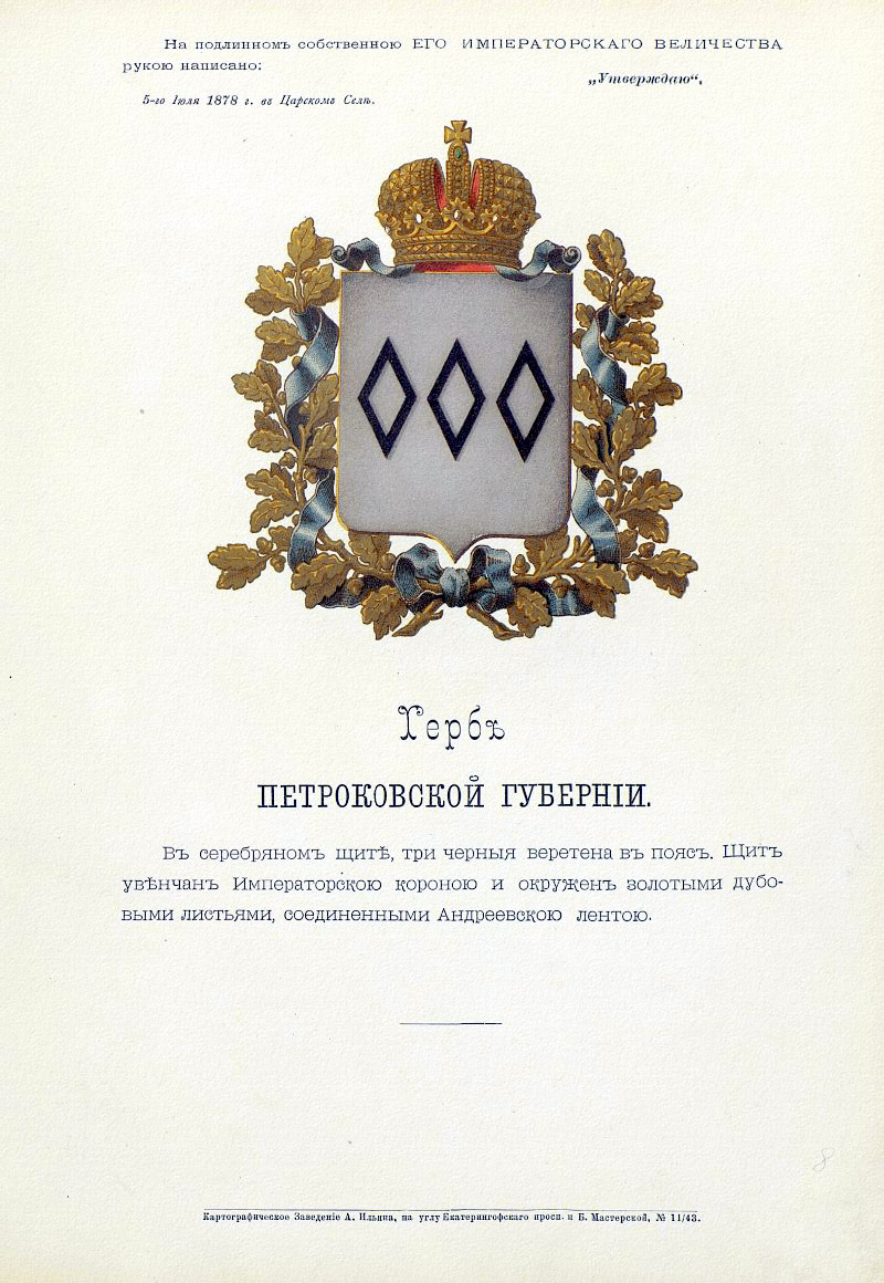 Official Russian Empire coat of arms Petrokov Governorate. Герб Российской Империи Петроковской губернии с официальным описанием в Гербовнике Бенке. Утверждён Императором Всероссийским Александром Вторым.